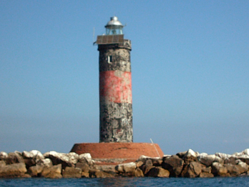 Uno scatto ravvicinato del Faro di Vada dalla barca